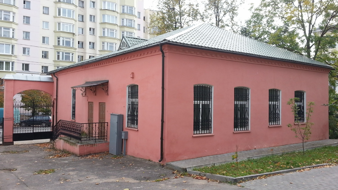 Беларуская (тарашкевіца): Забудова вул. Леніна. г. Віцебск This is a photo of Belarusian heritage monument. Reference number: 213Г000049 ( WLM)